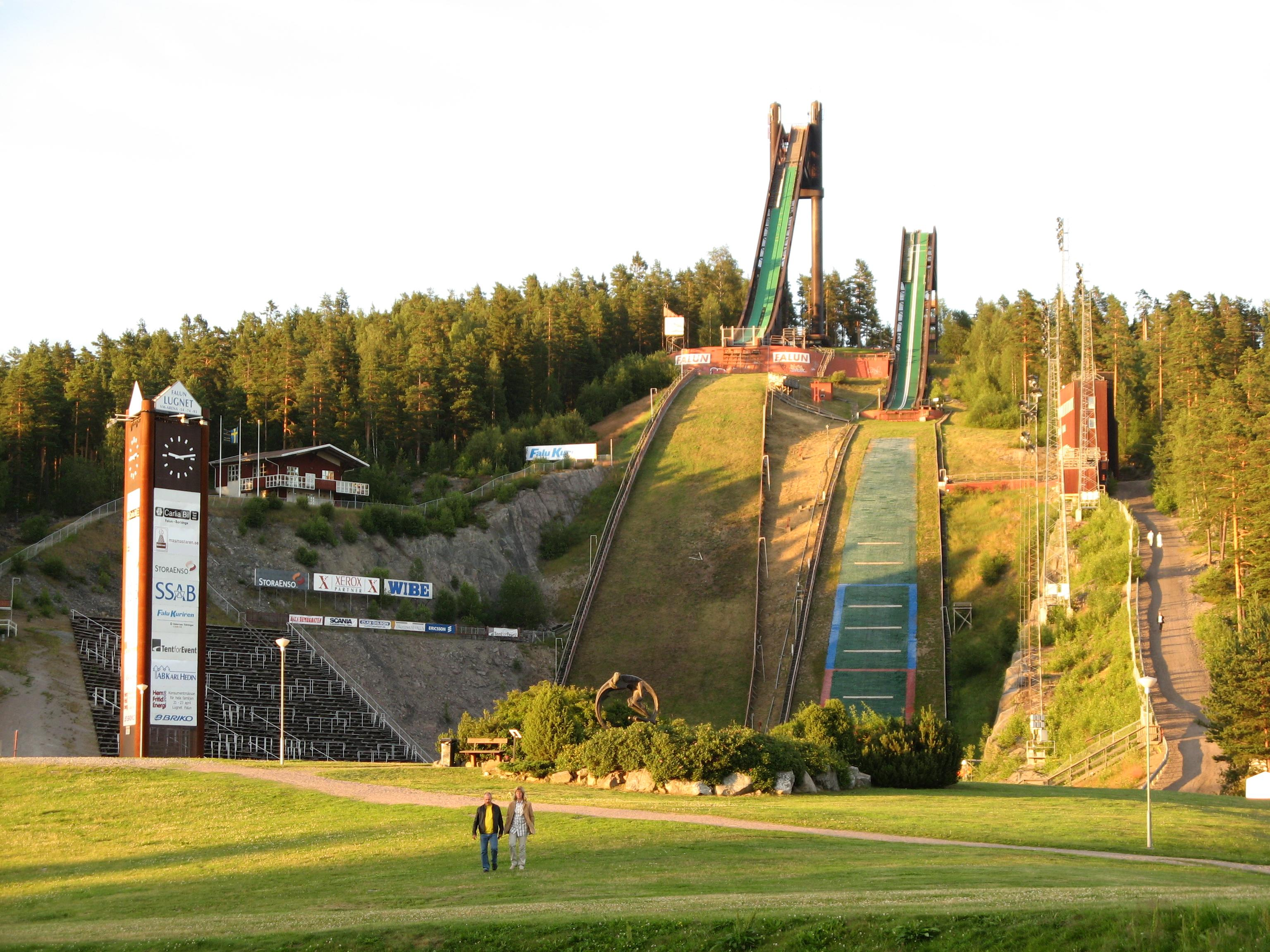 Ski jumping hill Lugnet in Falun, Sweden.